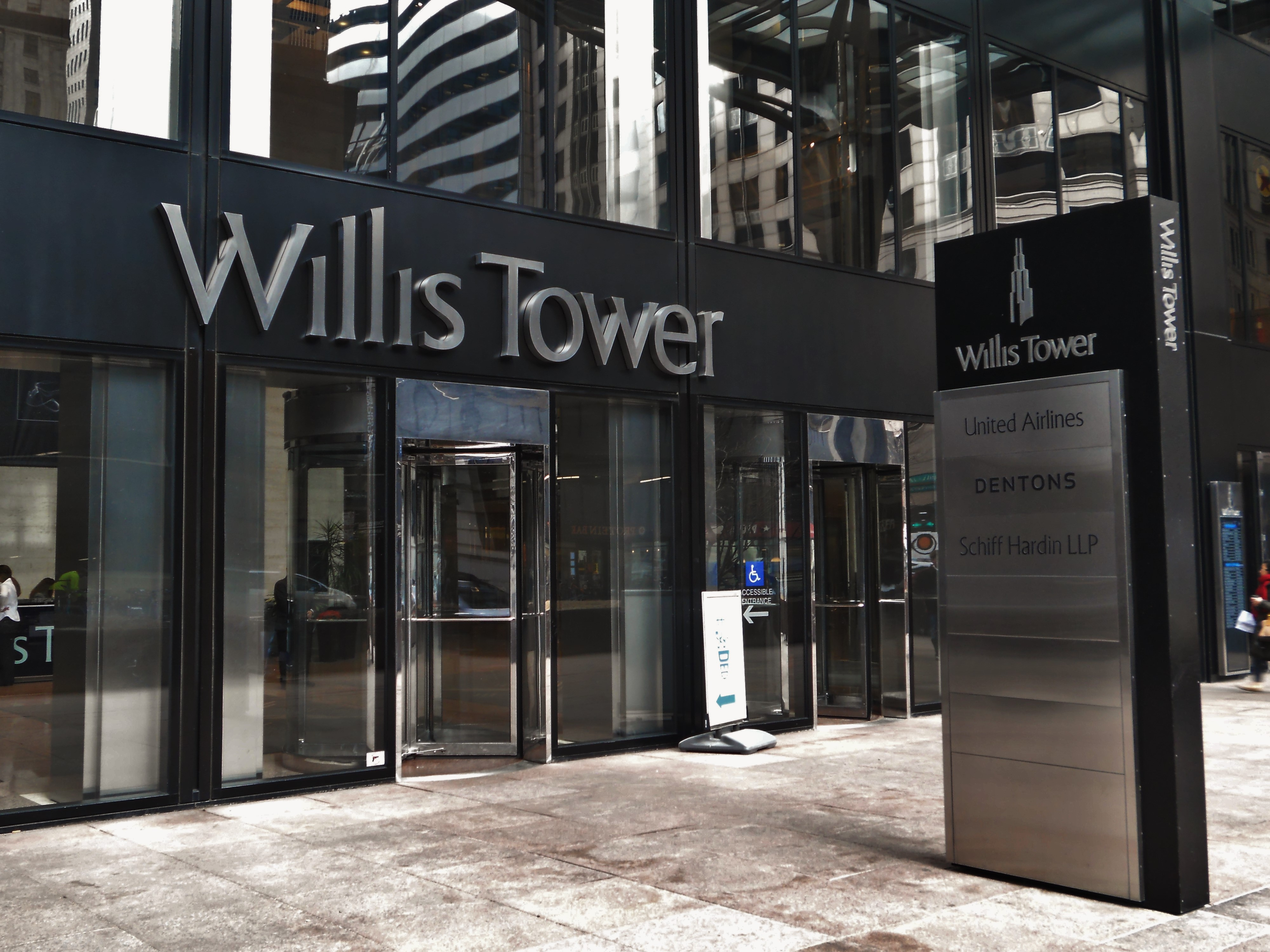 Willis Tower Entrance March 2015